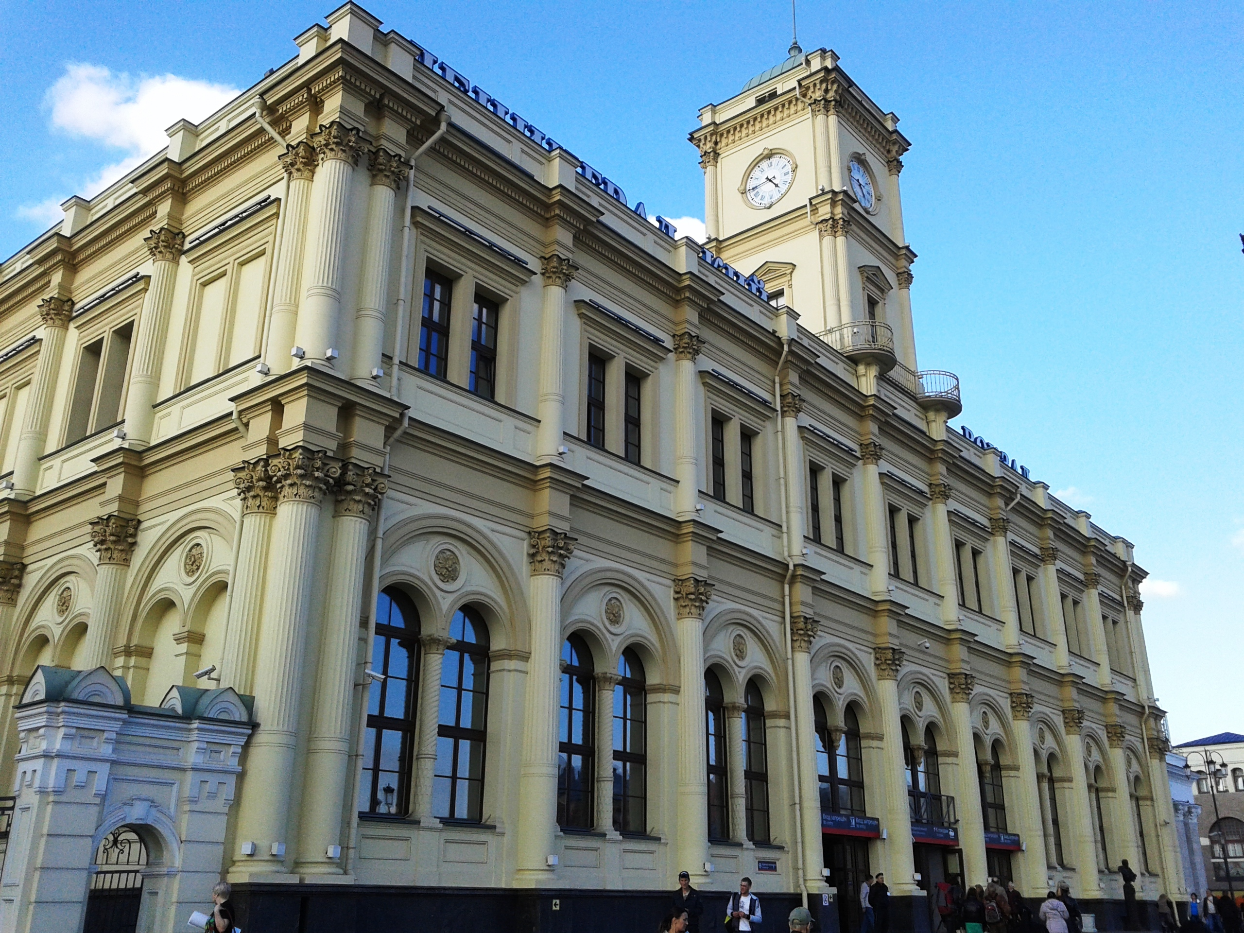 Здание Ленинградского вокзала: Комсомольская пл., дом 3, Красносельский, Центральный округ, Москва